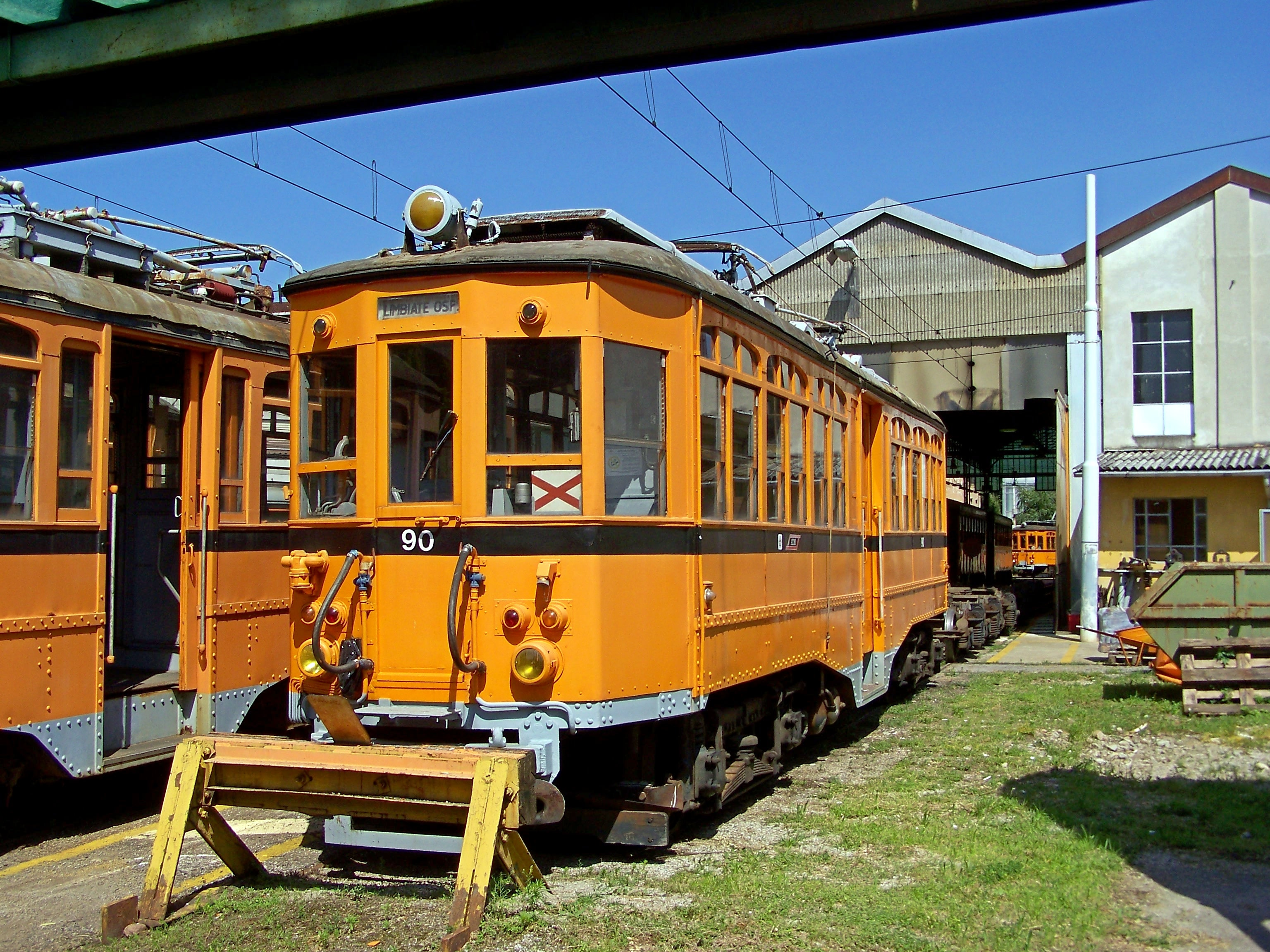 L'elettromotrice "Reggio Emilia" 90 rimessa al Deposito di Varedo